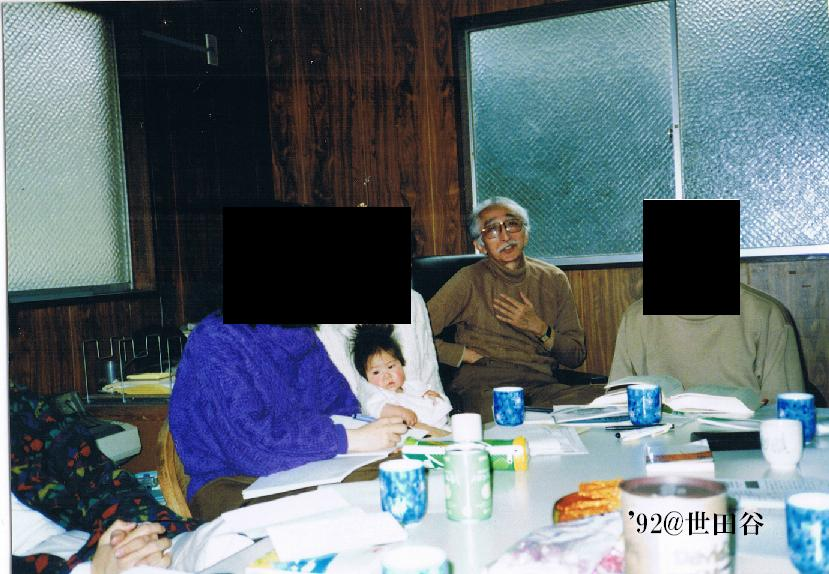 土師さんの自宅離れにて。